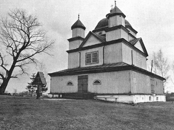 Беларуская (тарашкевіца): Смальяны (Smaljany), вуліца Спаская (vulica Spaskaja). Царква Сьвятога Спаса